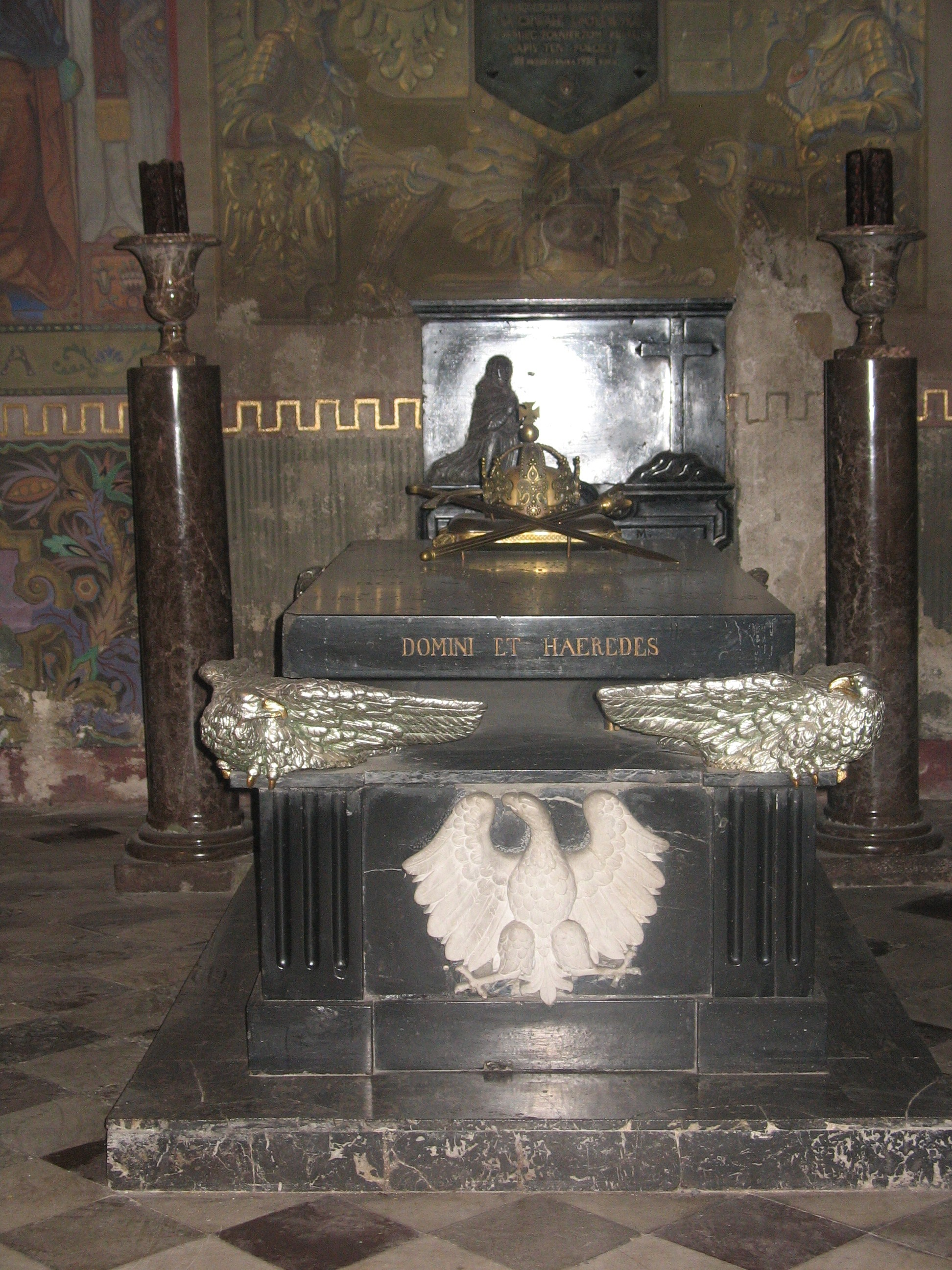 Sarkofag Władysława Hermana i Bolesława Krzywoustego w katedrze płockiej.